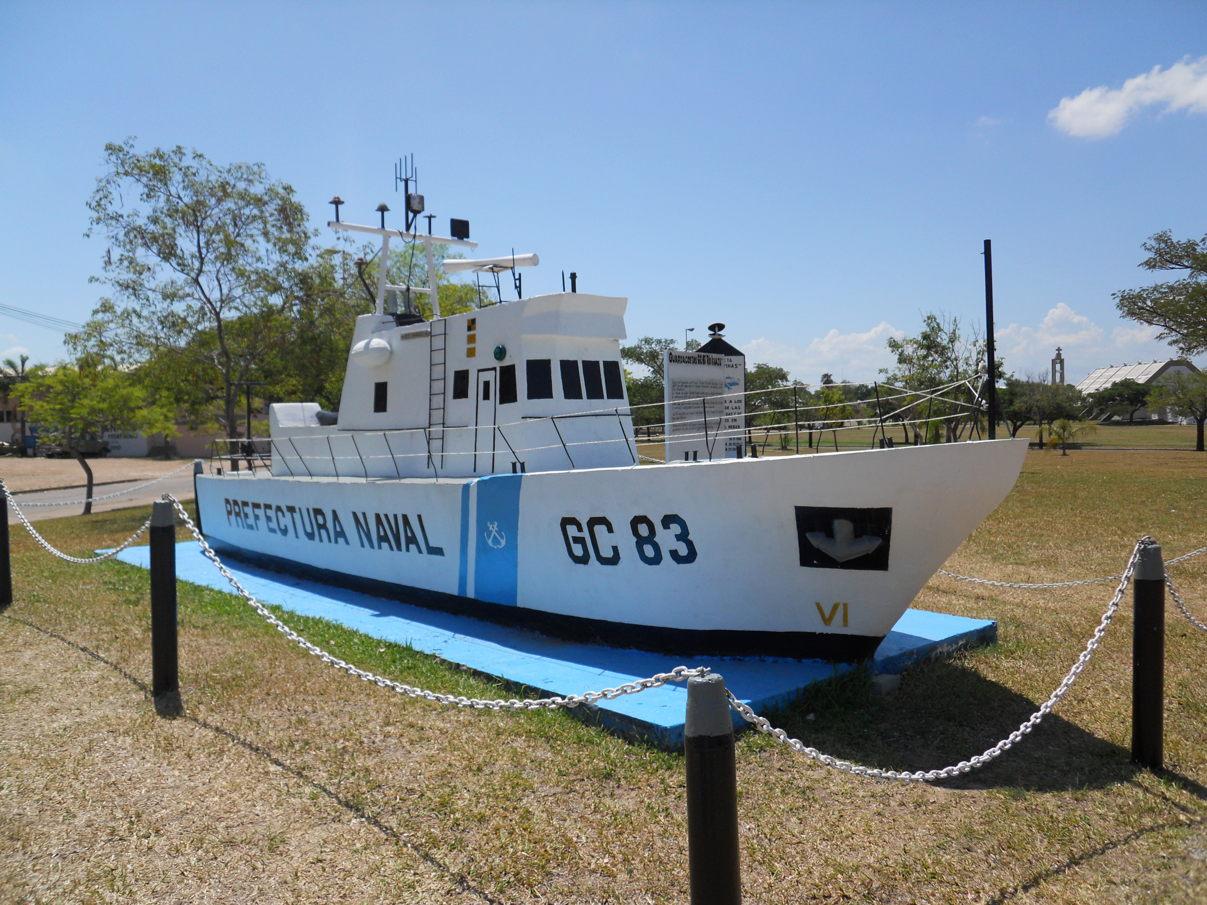 Replica de la lancha guardacostas Río Iguazú (GC-83) en la ciudad de Federación, Entre Rios, Argentina.